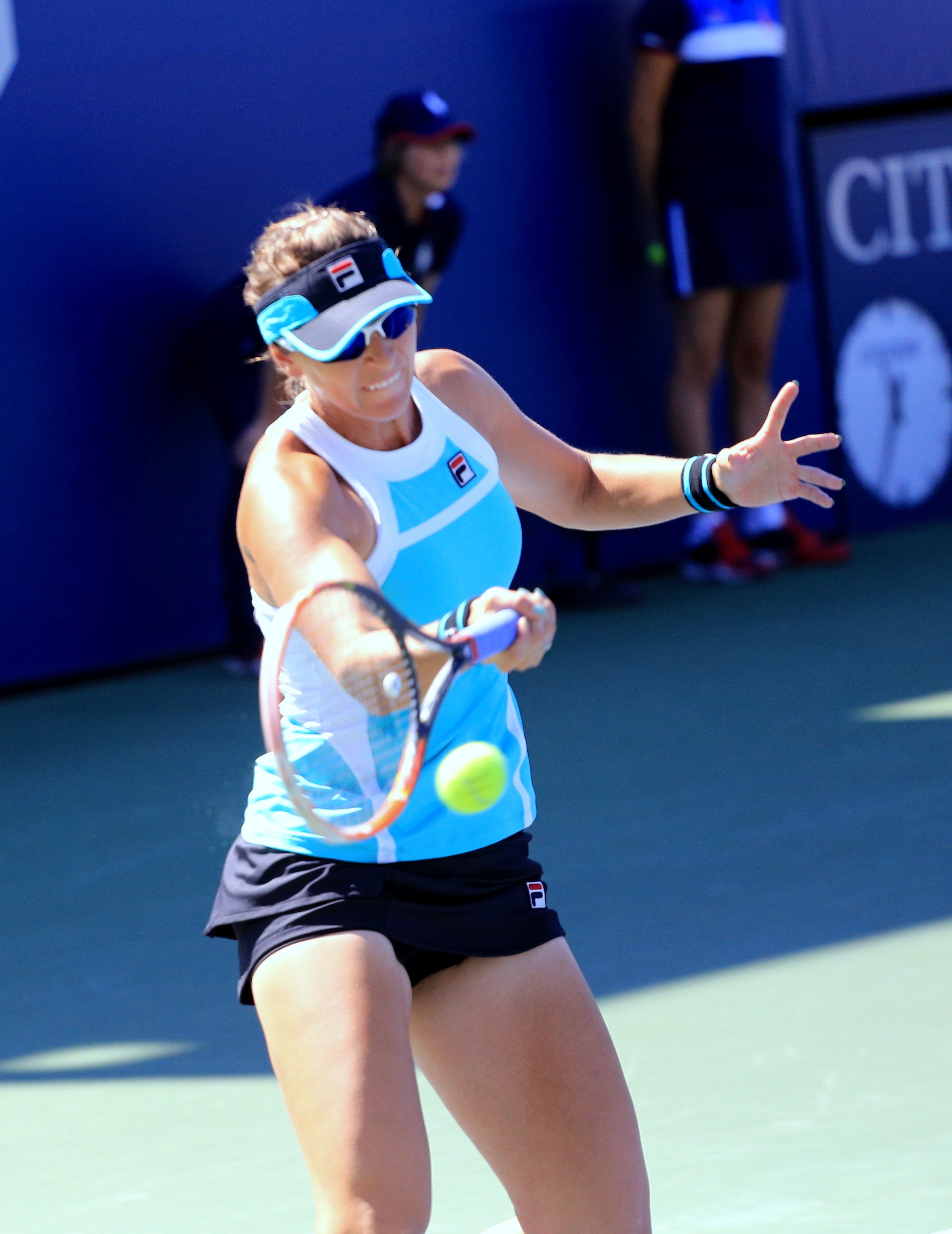 Yaroslava Shvedova at the 2015 US Open